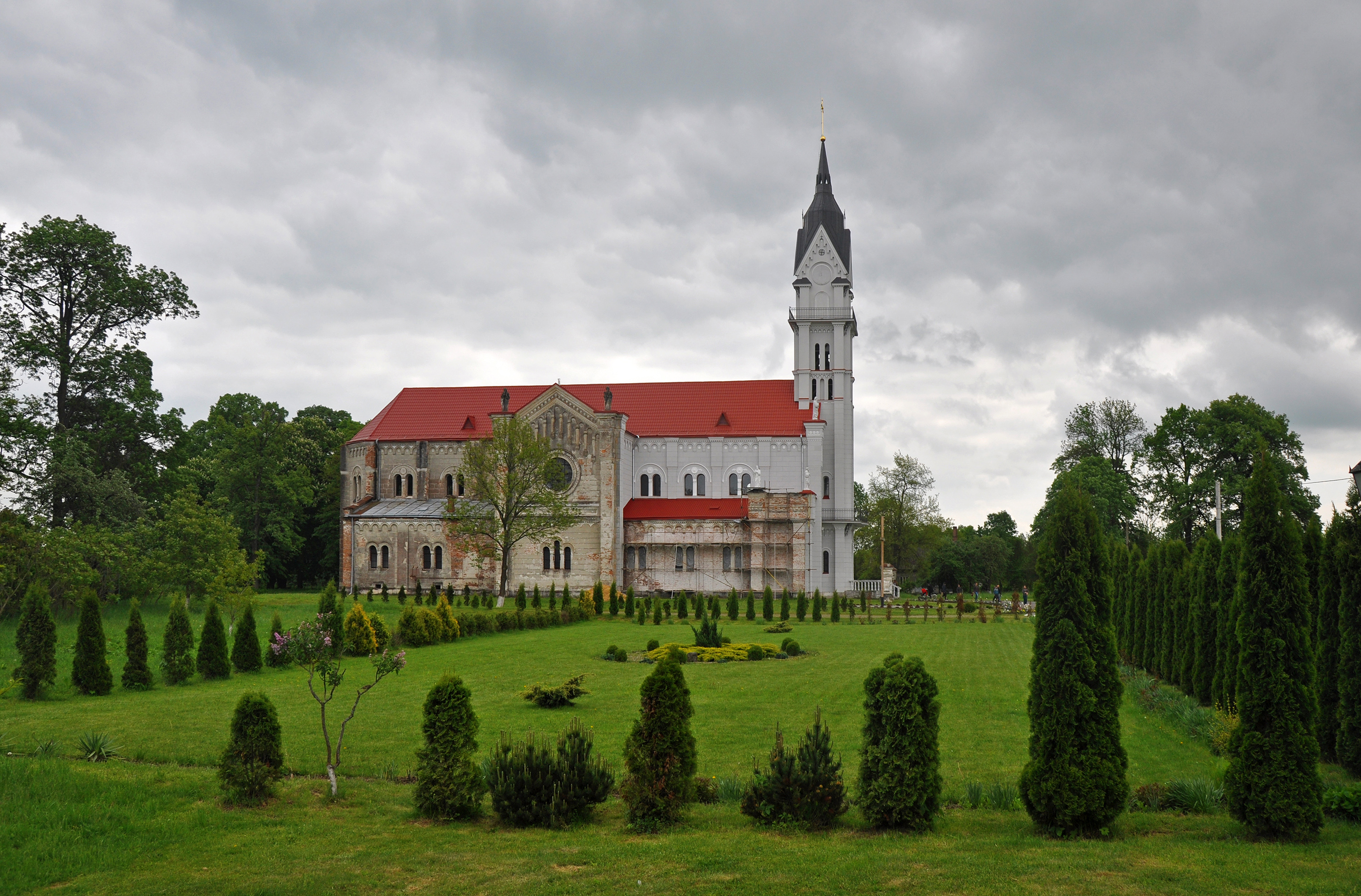 Костел Парафіяльний, смт. Гніздичів, Кохавино,вул. Я. Мудрого